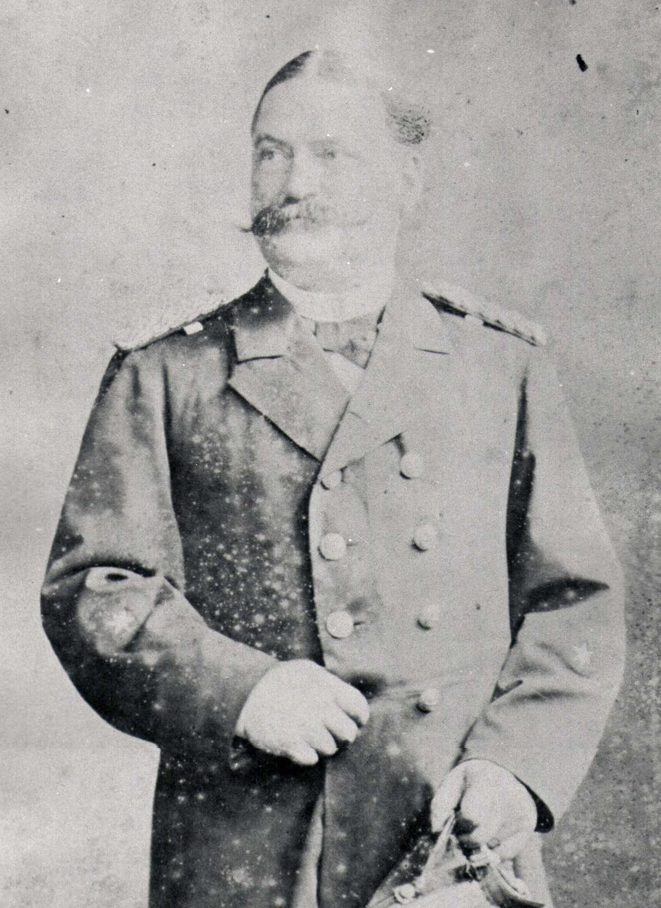 Fotografie des Konteradmirals Rudolf Schering